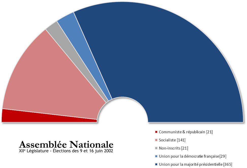 Assemblée Nationale française issue des élections législatives de juin 2002